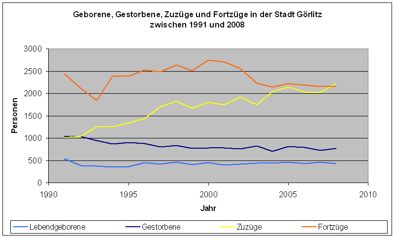 Lebendgeborene, Gestorbene, Zuzüge und Fortzüge der Stadt Görlitz (Quelle: Stadtverwaltung Görlitz, Kommunale Statistikstelle (Hrsg.): Statistisches Jahrbuch 2009. Stadtverwaltung Görlitz, Zentrale Kopierstelle, 2009.)